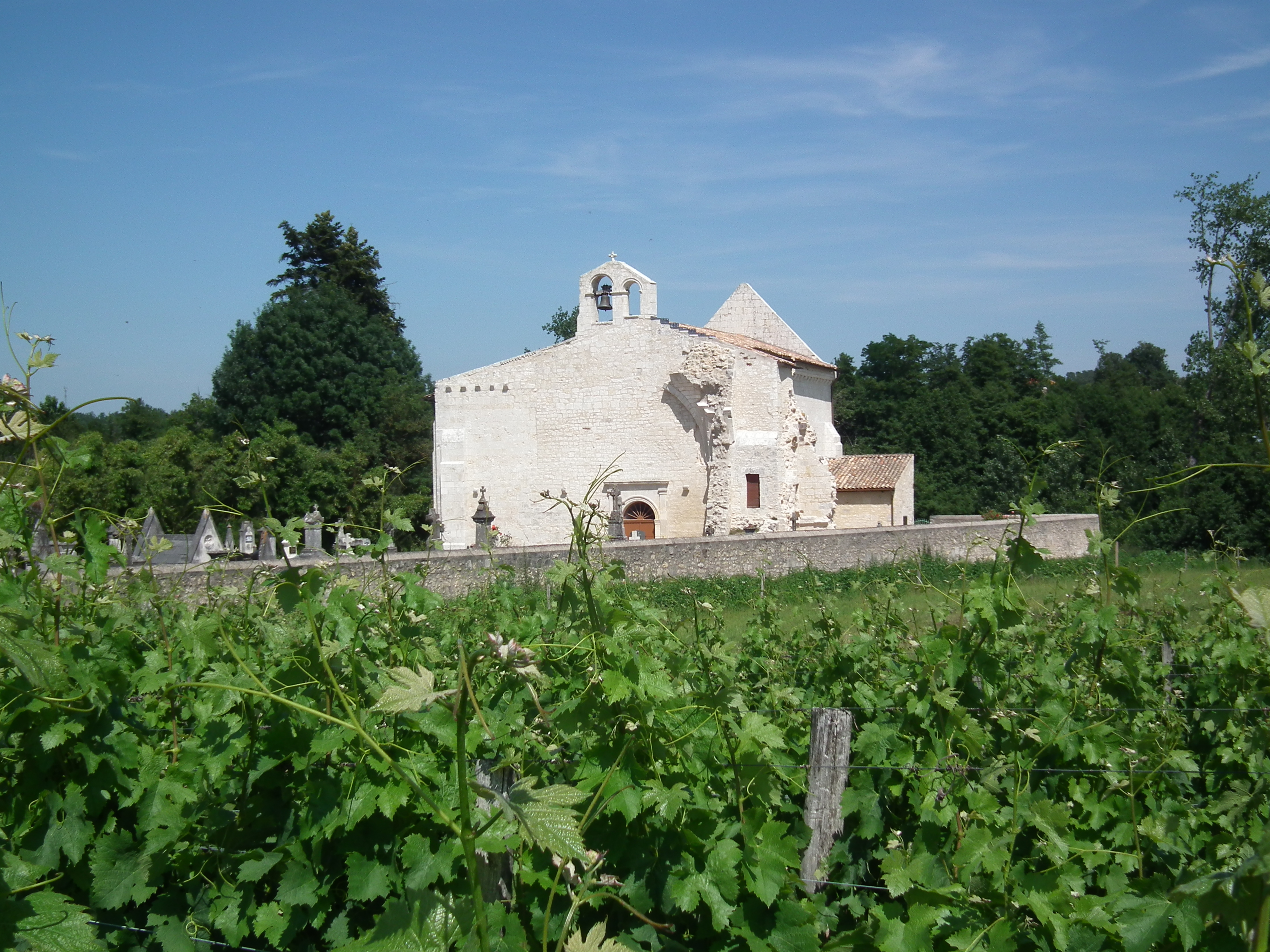 Le village de Pleine-Selve